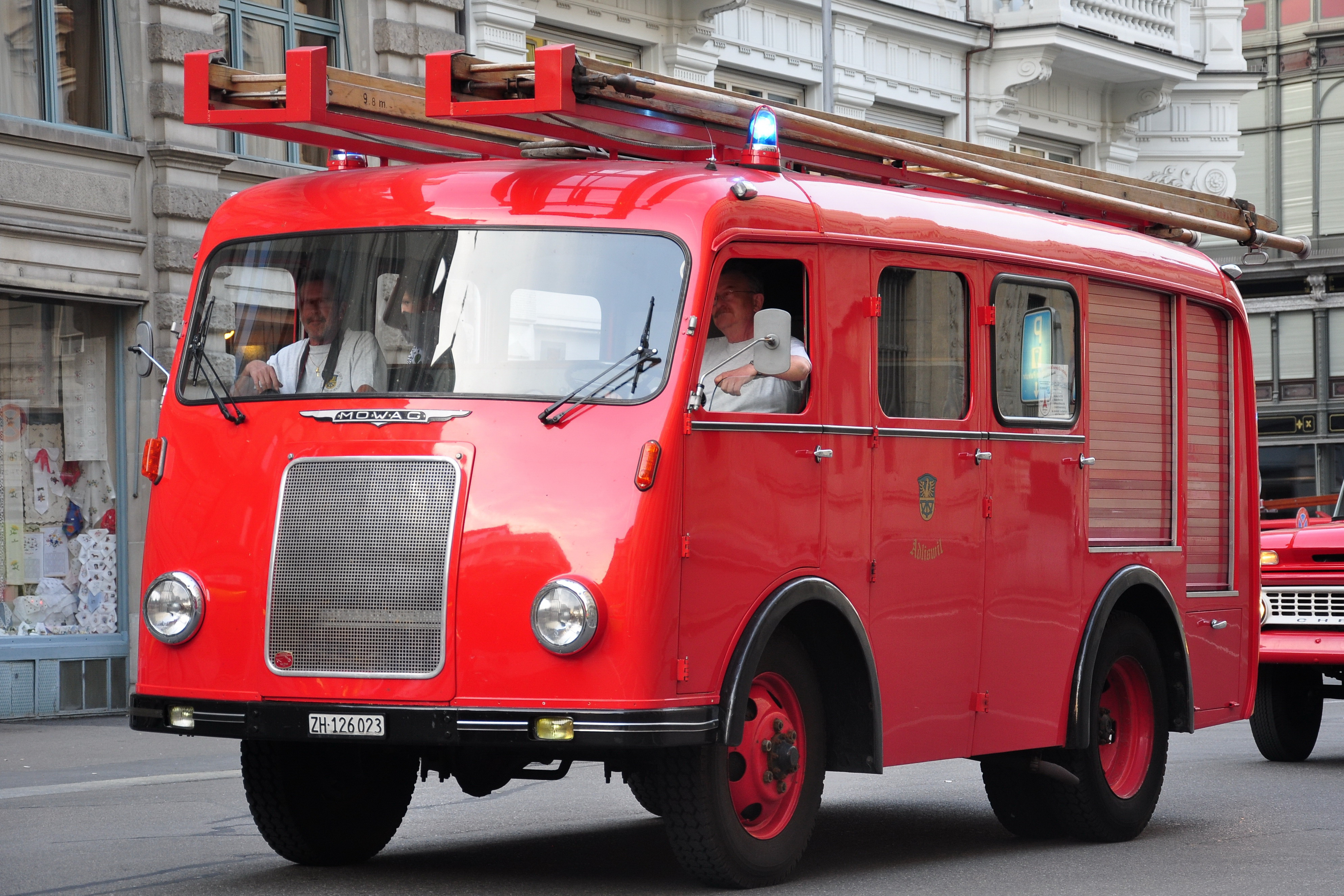 10 Jahre SRZ Jubiläumsanlass (13. und 14. Mai 2011) von Schutz & Rettung, Oldtimertreffen von Feuerwehrfahrzeugen der umliegenden Stadtgemeinden auf dem Münsterhof respektive Fahrzeugumzug (Bahnhofstrasse) in Zürich (Switzerland)